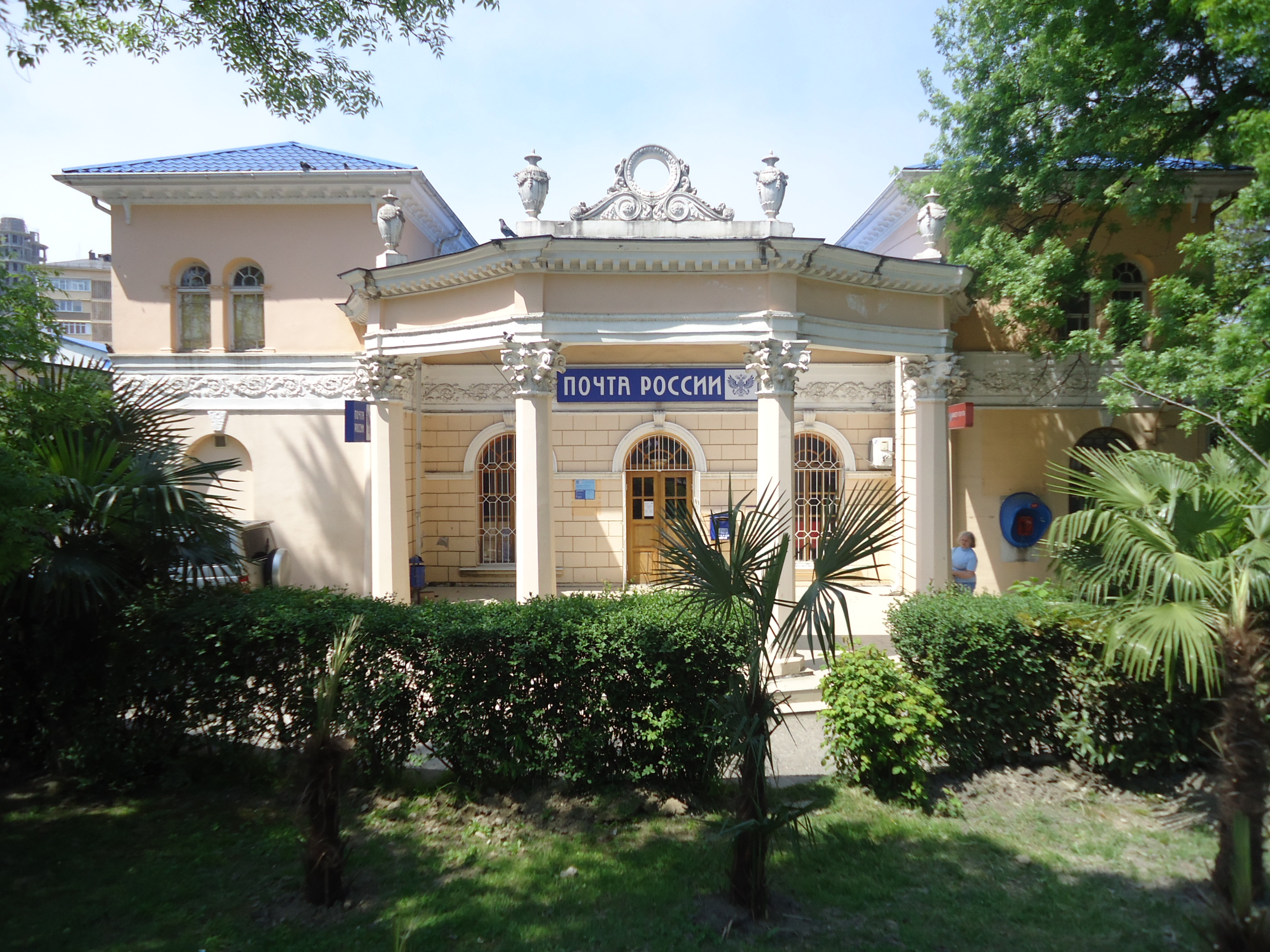 по адресу ул. Виноградная, г.Сочи